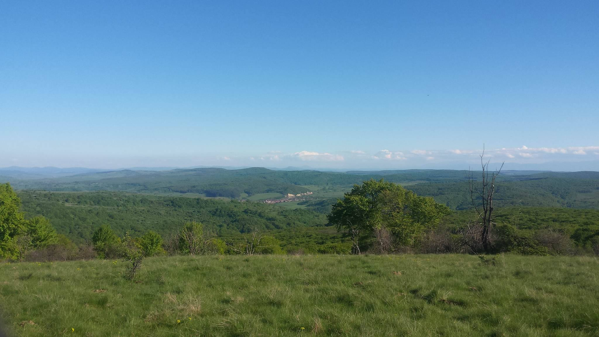 Satul Archita vazut din varful dealului Pietris.